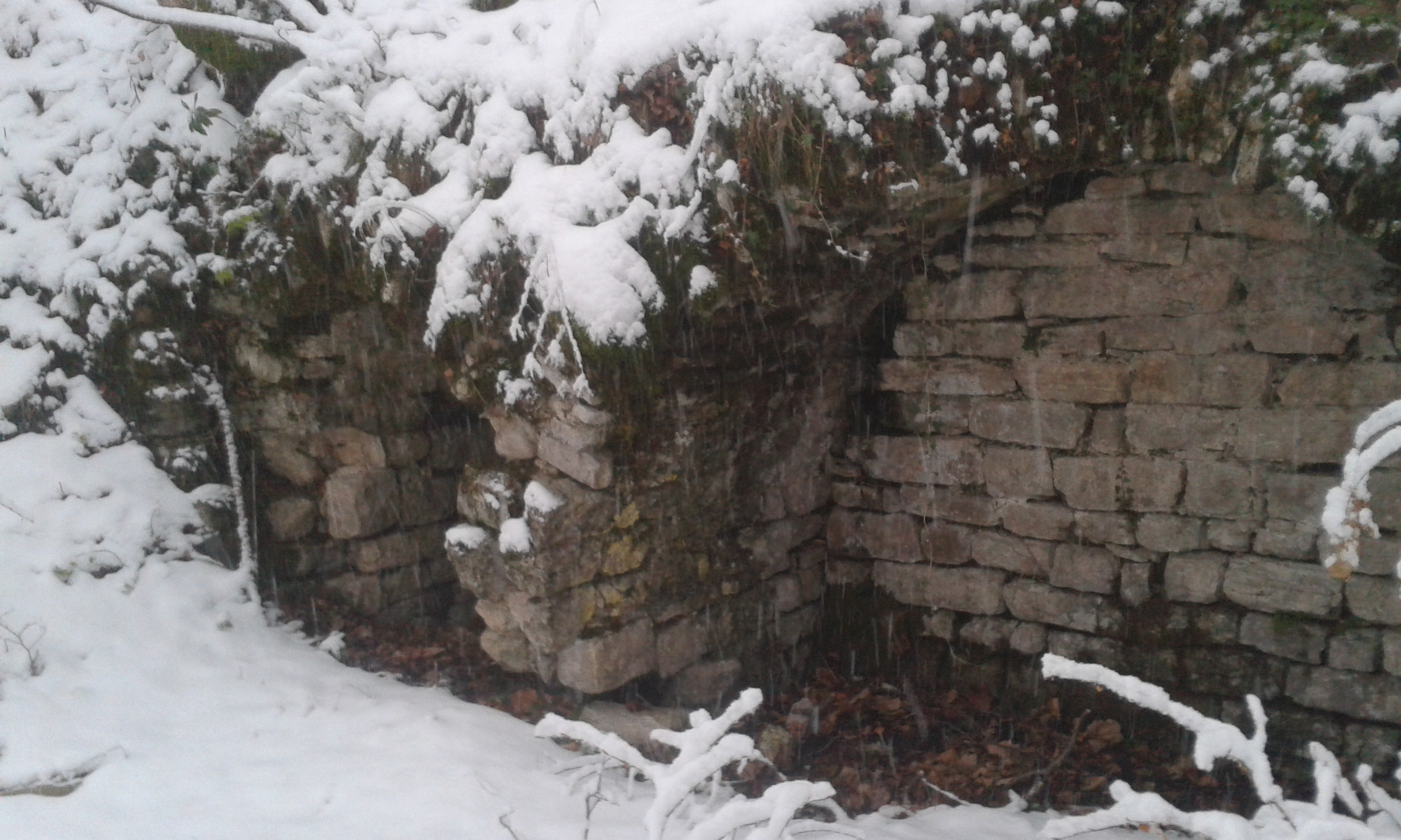 Fonti anticamente annesse all'eremo di San Leonardo del Volubrio, presso l'Infernaccio